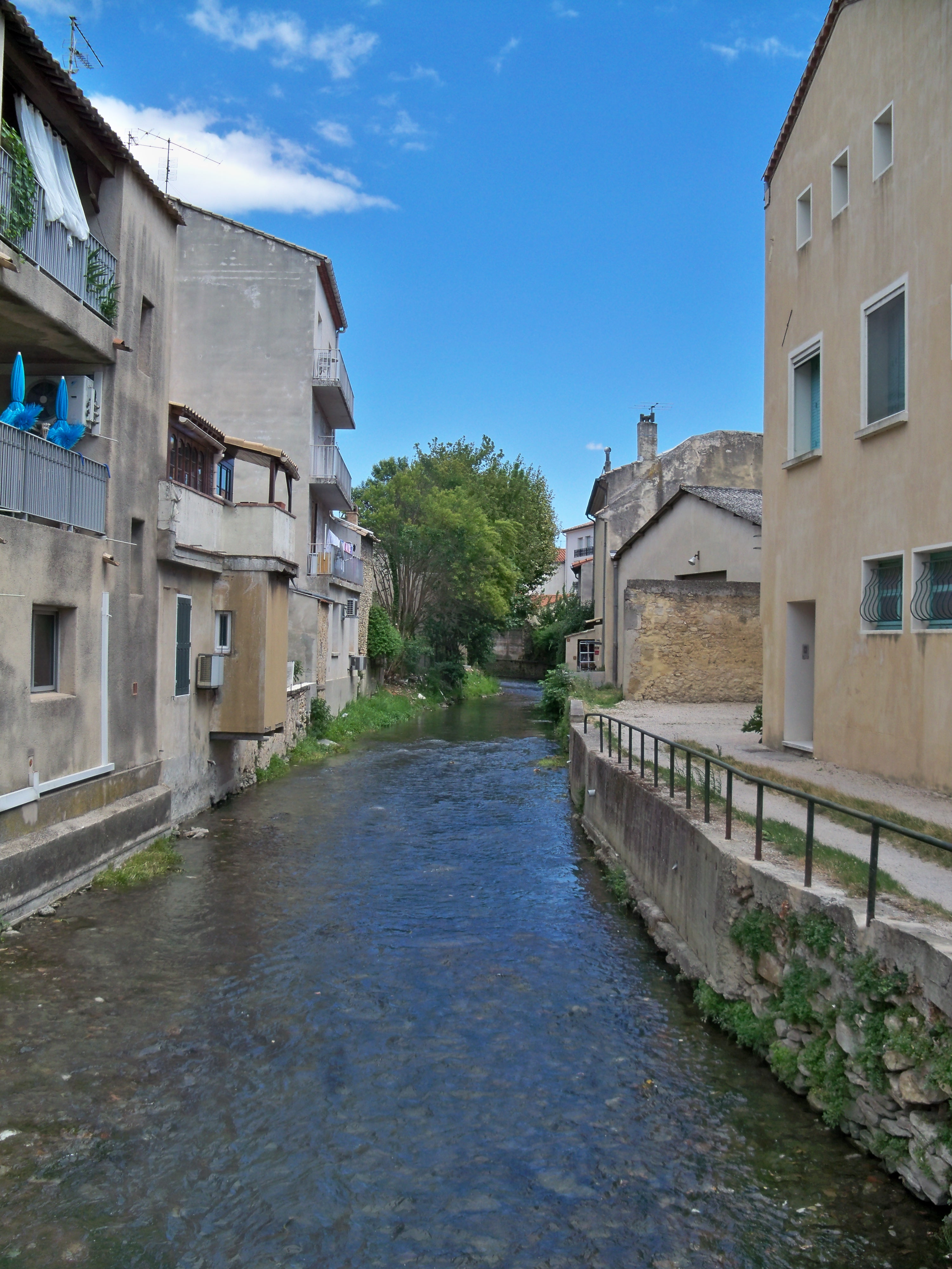 rivière la Meyne, à Orange, Vaucluse, France